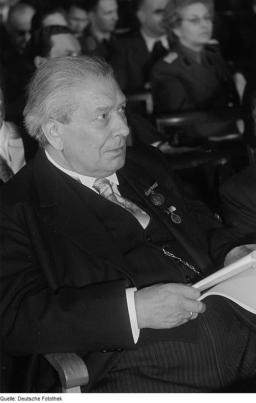 Original image description from the Deutsche Fotothek Porträt des Prof. Dr. Jussuf Ibrahim